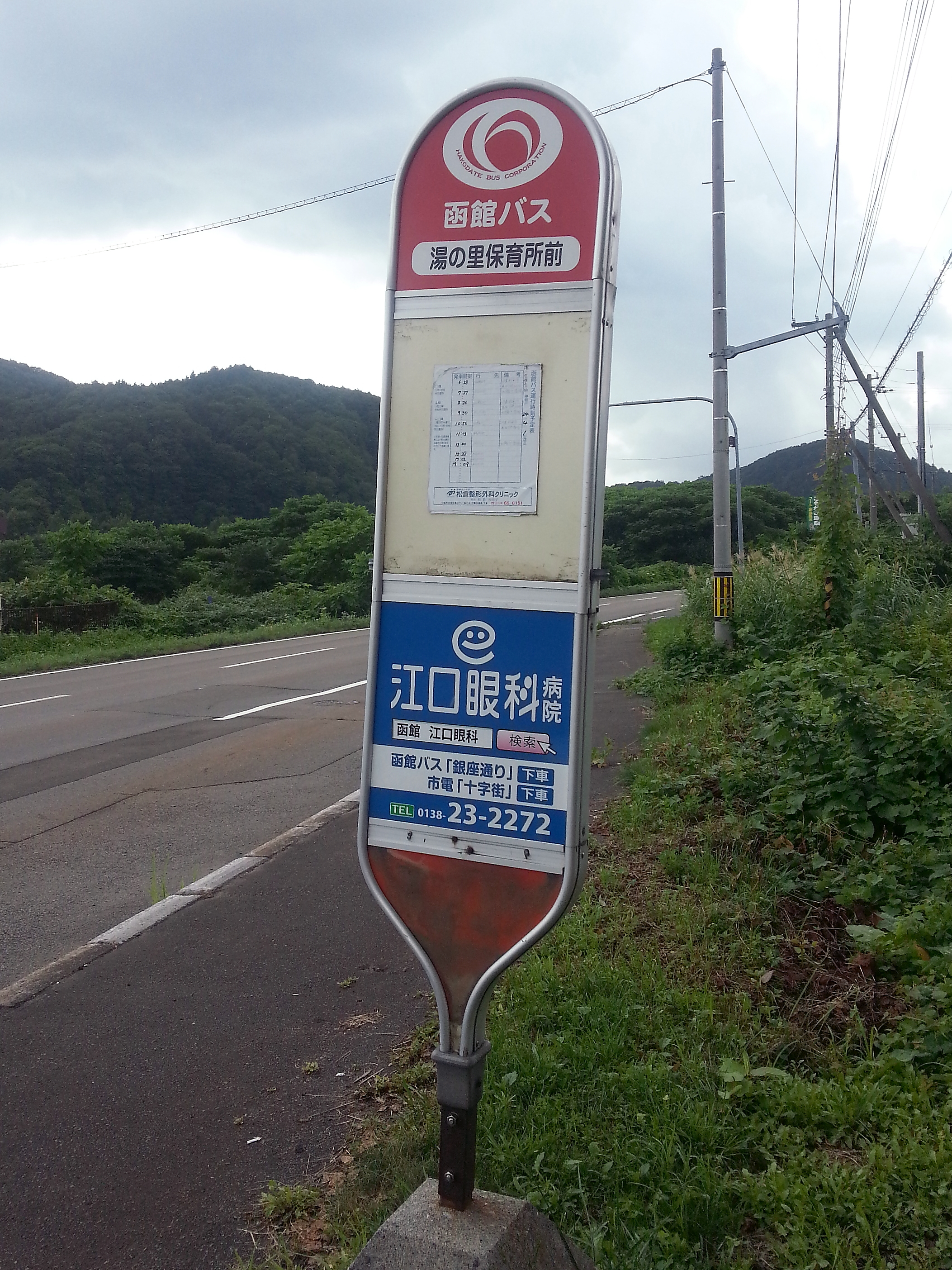 函館バス 湯の里保育所前 バス停